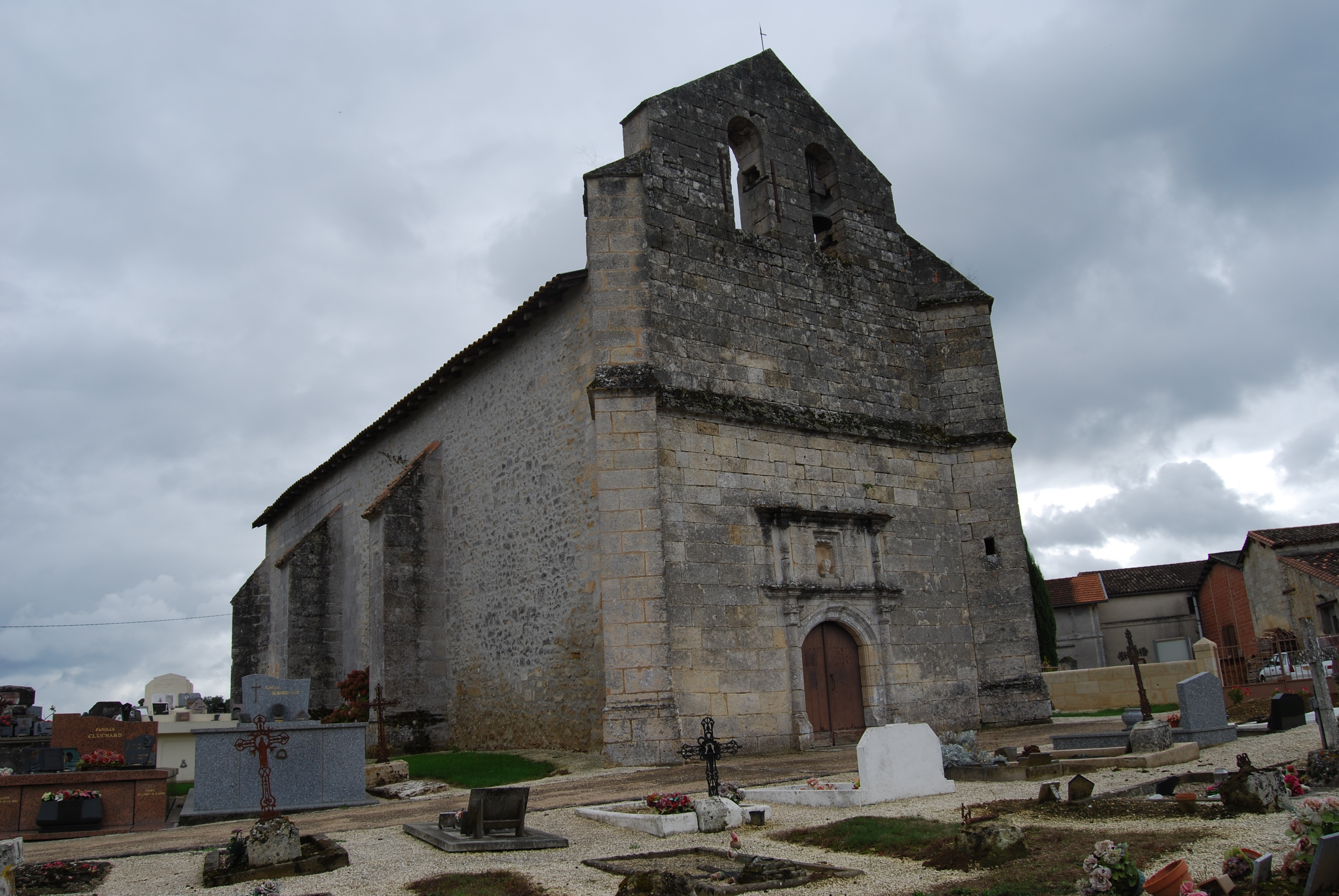 Église de Saint-Léon, (Inscrit, 1925) .